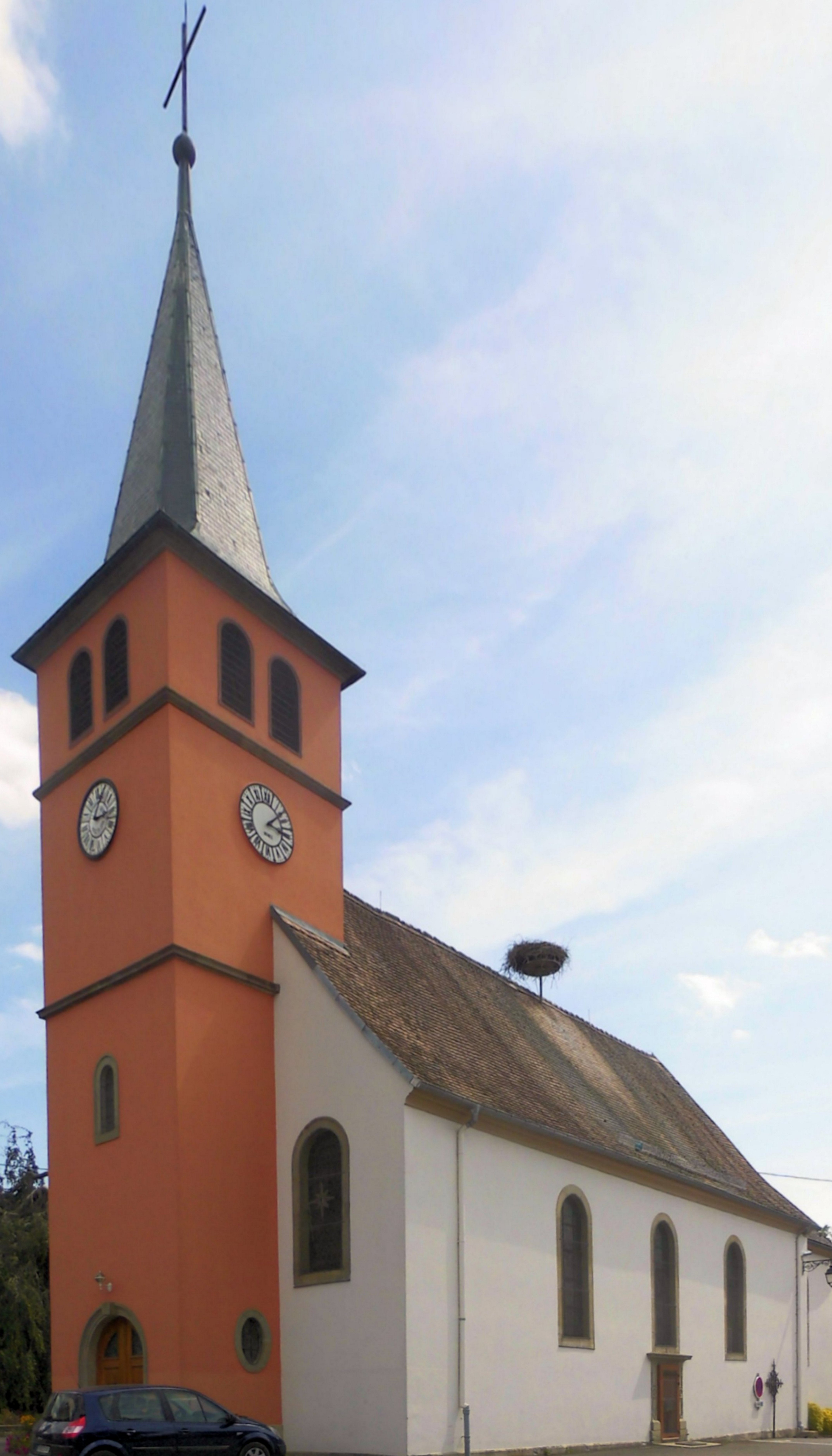 L'église Saint-Georges à Largitzen